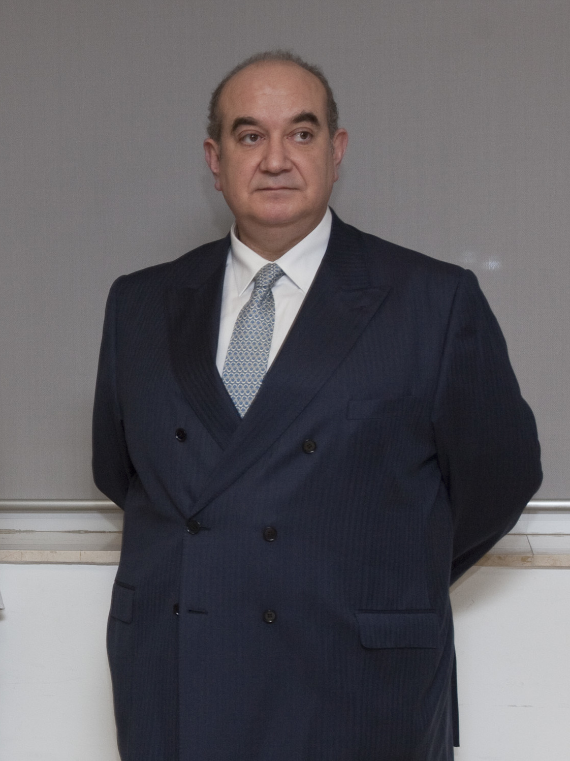 La consejera de Economía, Hacienda y Empleo, Cristina Mazas, ha presidido hoy la toma de posesión de Inmaculada Valencia Bayón como directora general de Economía y Asuntos Europeos. En el acto ha estado presente, además, el secretario general de la Consejería, Emilio del Valle.